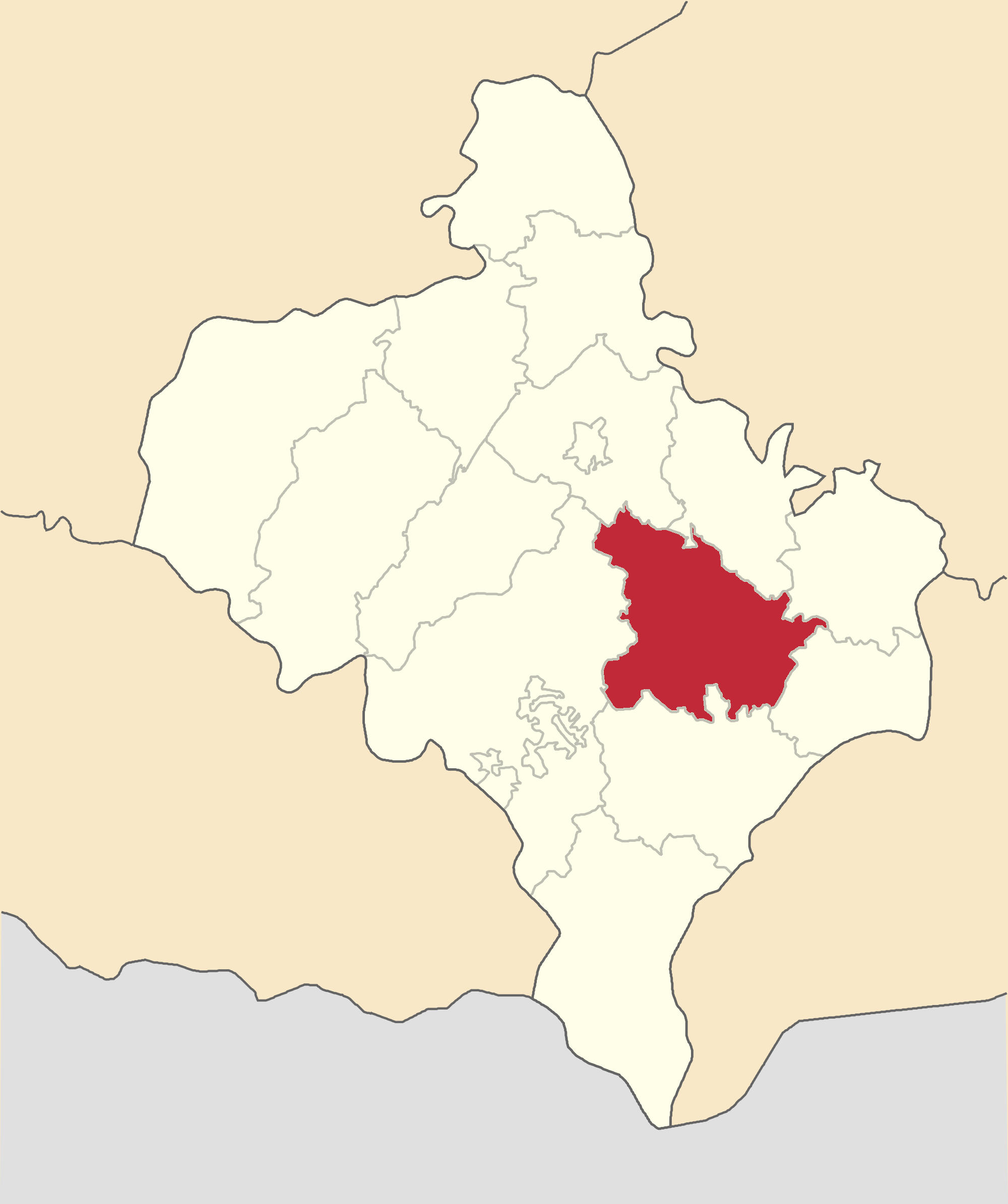 Kolomyyskyi-Raion map